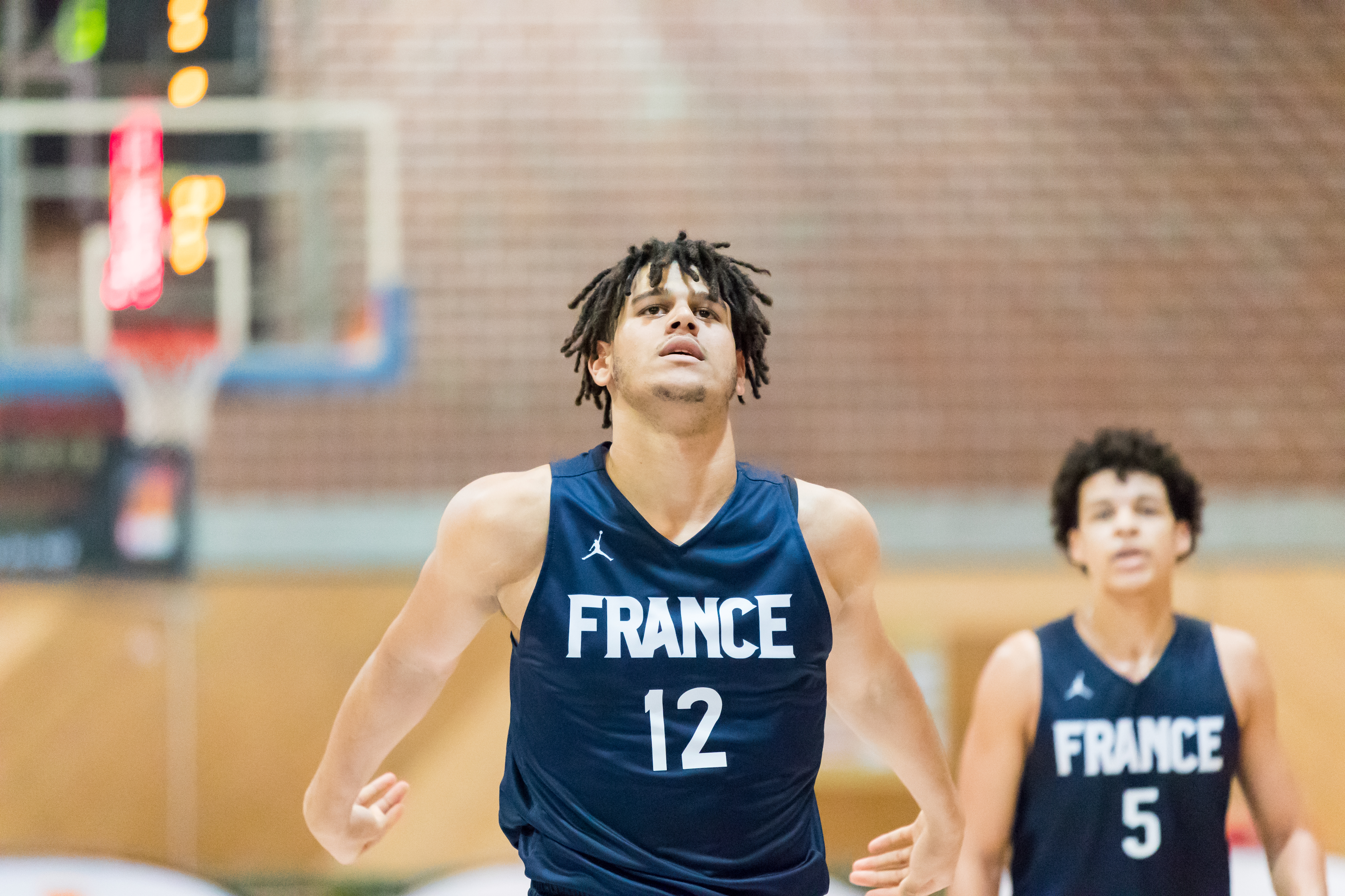 USA vs France 73:79 during Basketball Albert Schweitzer Turnier at Waldsporthalle, Viernheim, Hessen, Germany on 2018-03-31, Photo: Sven Mandel